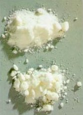 Cocaine powder